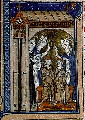 Louis III et Carloman furent couronnés rois en 879 par l'archevêque de Sens Anségise, dans l'abbaye bénédictine Saint-Pierre-et-saint-Paul de Ferrières en Gâtinais.